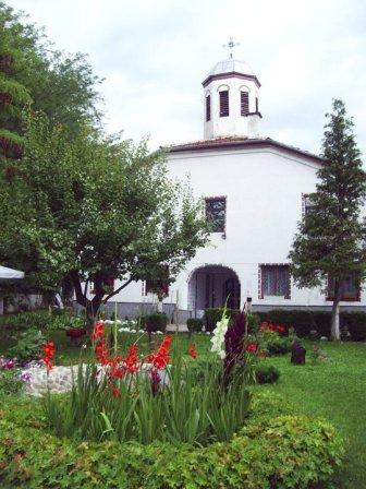 Църква "Успение Богородично" с. Бараково